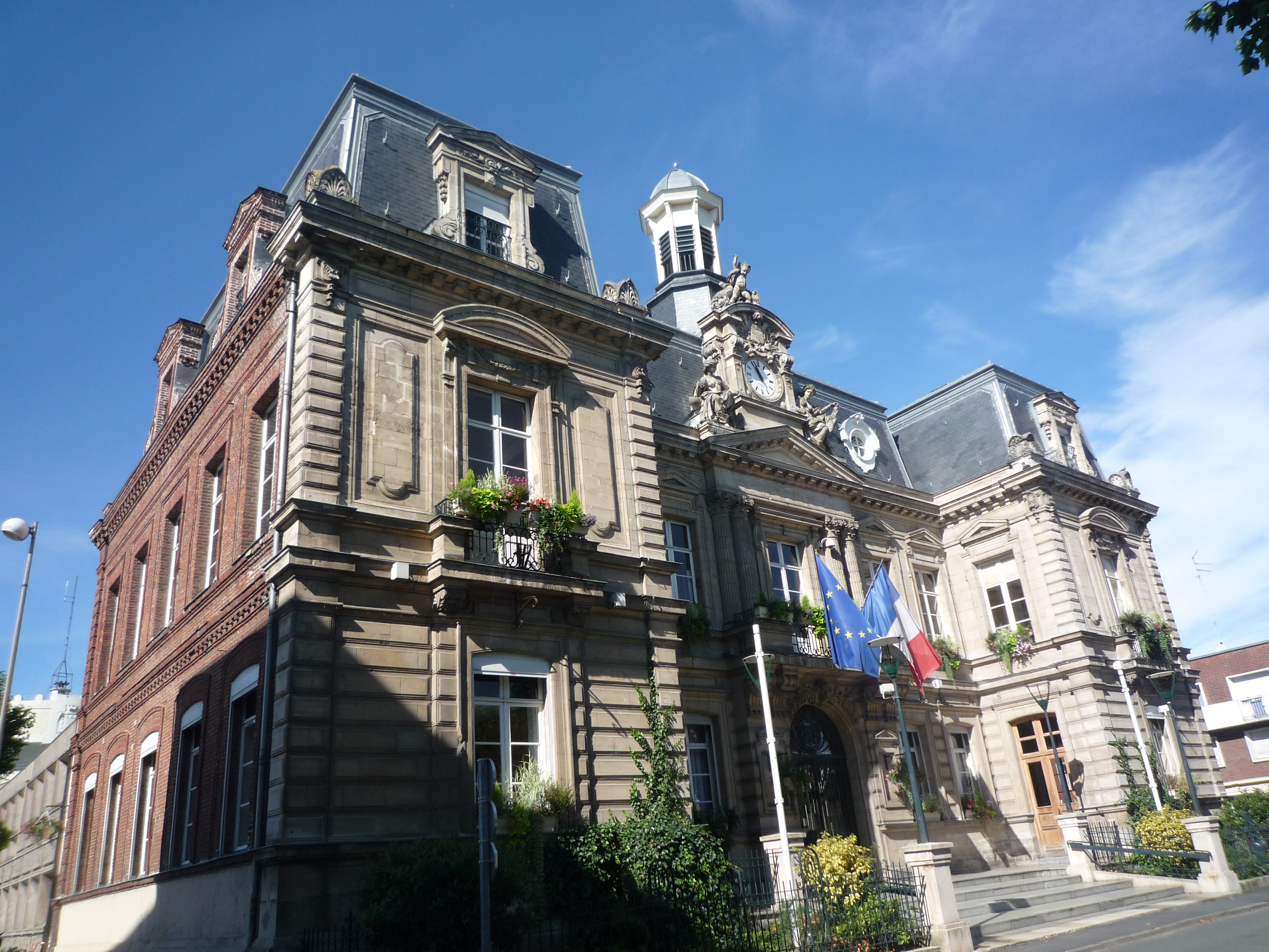 Mairie, Anzin, Nord, Nord-Pas-de-Calais, France.